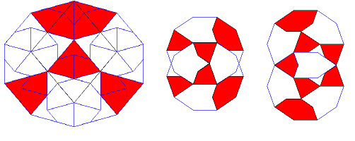 Decagone de Gummelt